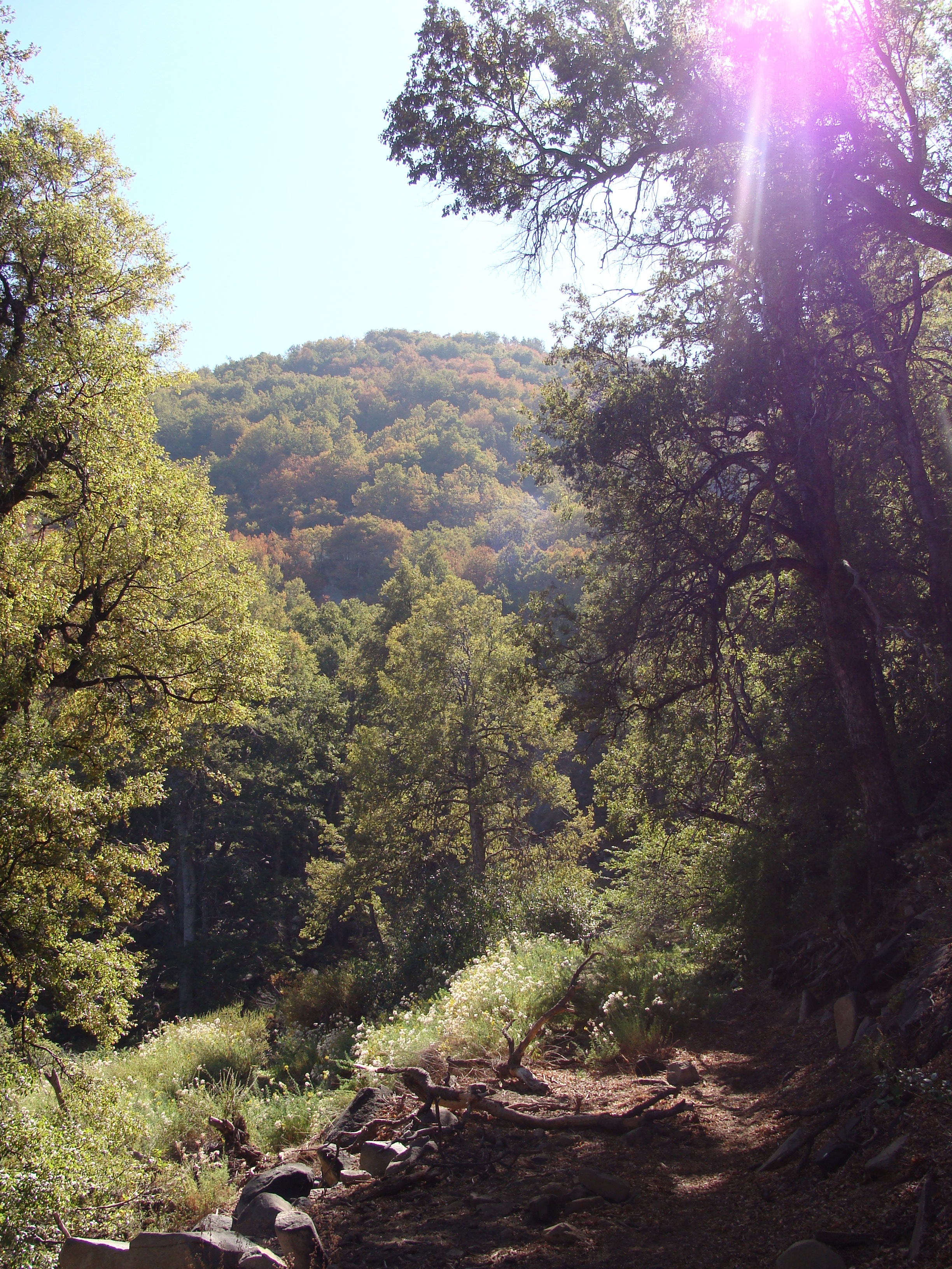 Sector del Cerro El Roble This is a photo of a national monument in Chile: 899